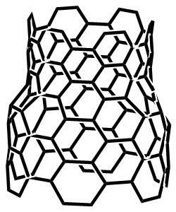 fig 17